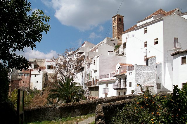 Vista de Salares. En primer plano el puente medieval.